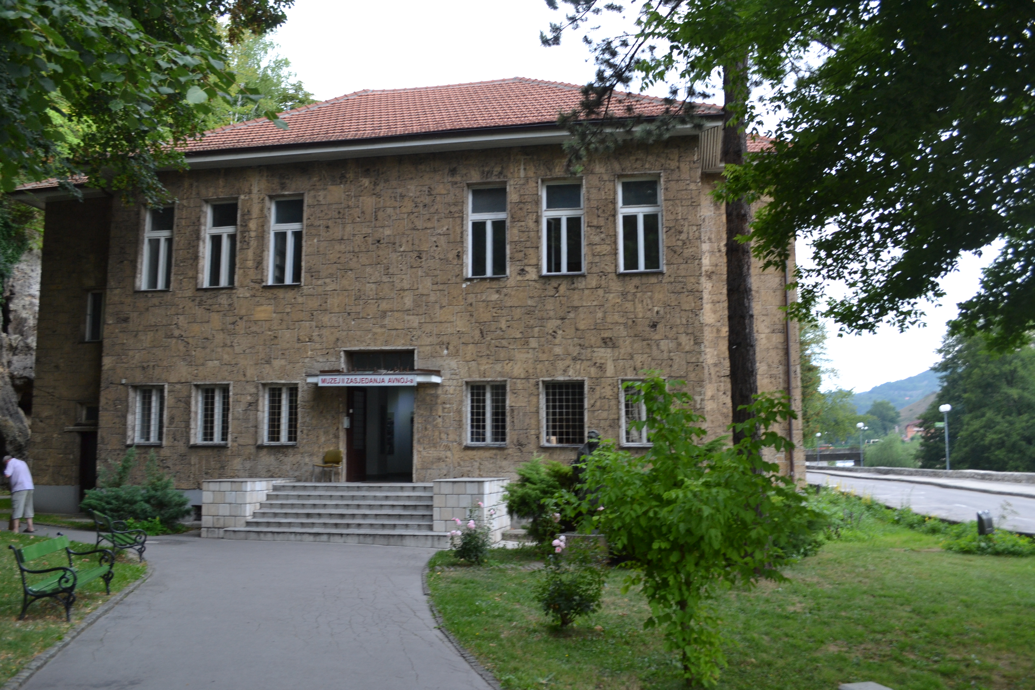 Muzej AVNOJ-a u Jajcu